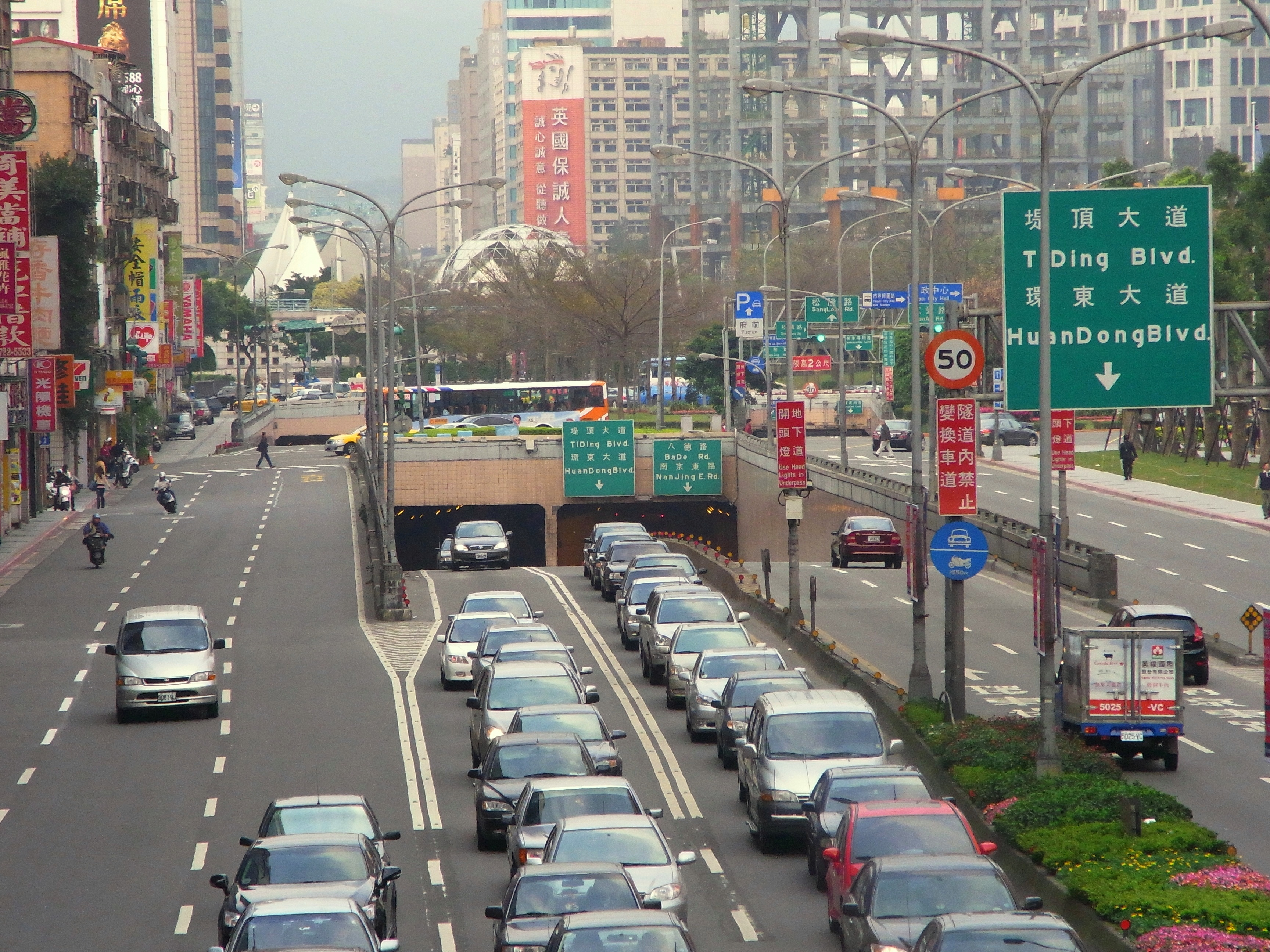 台北市基隆路車行地下道